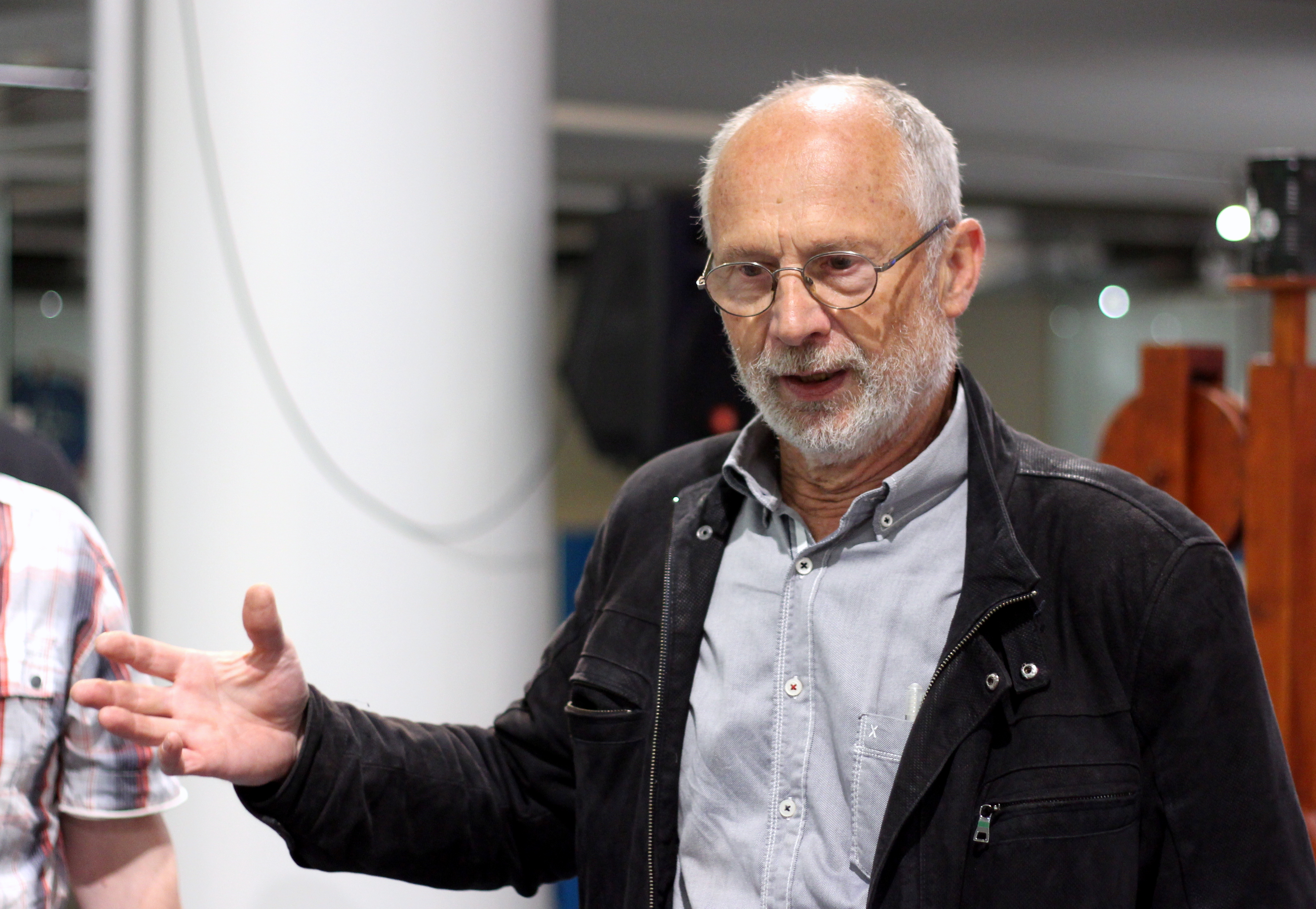 Deutsches Museum Bonn. GLAM. Horst Langer.